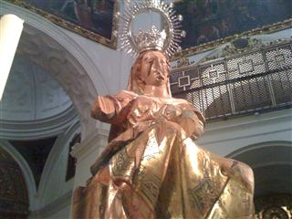 Nuestra Señora de la Vulnerata